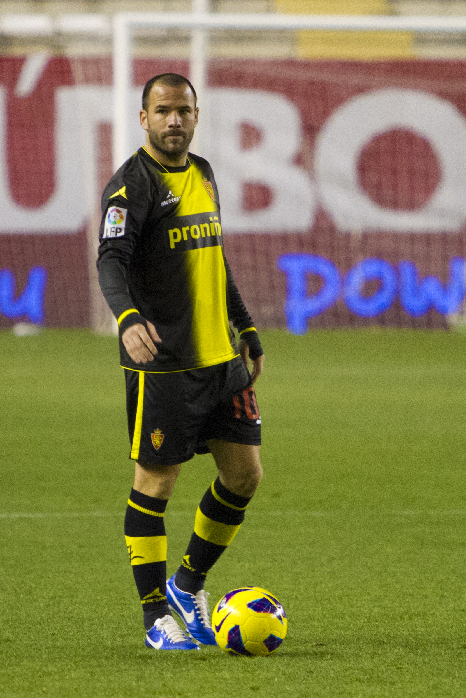 rayo vallecano vs real zaragoza